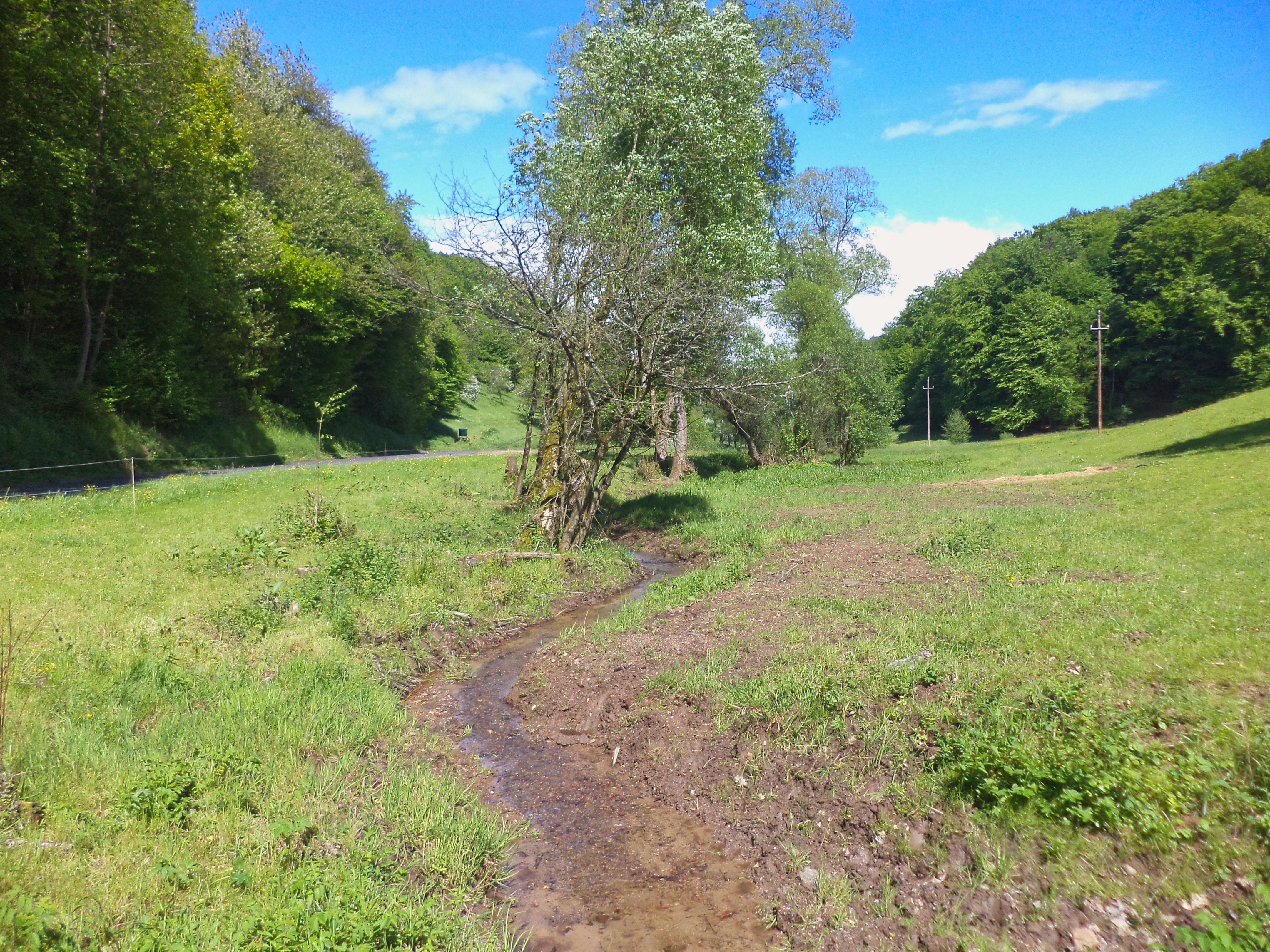 Der Hemsbach zwischen Brücken und Hemsbach